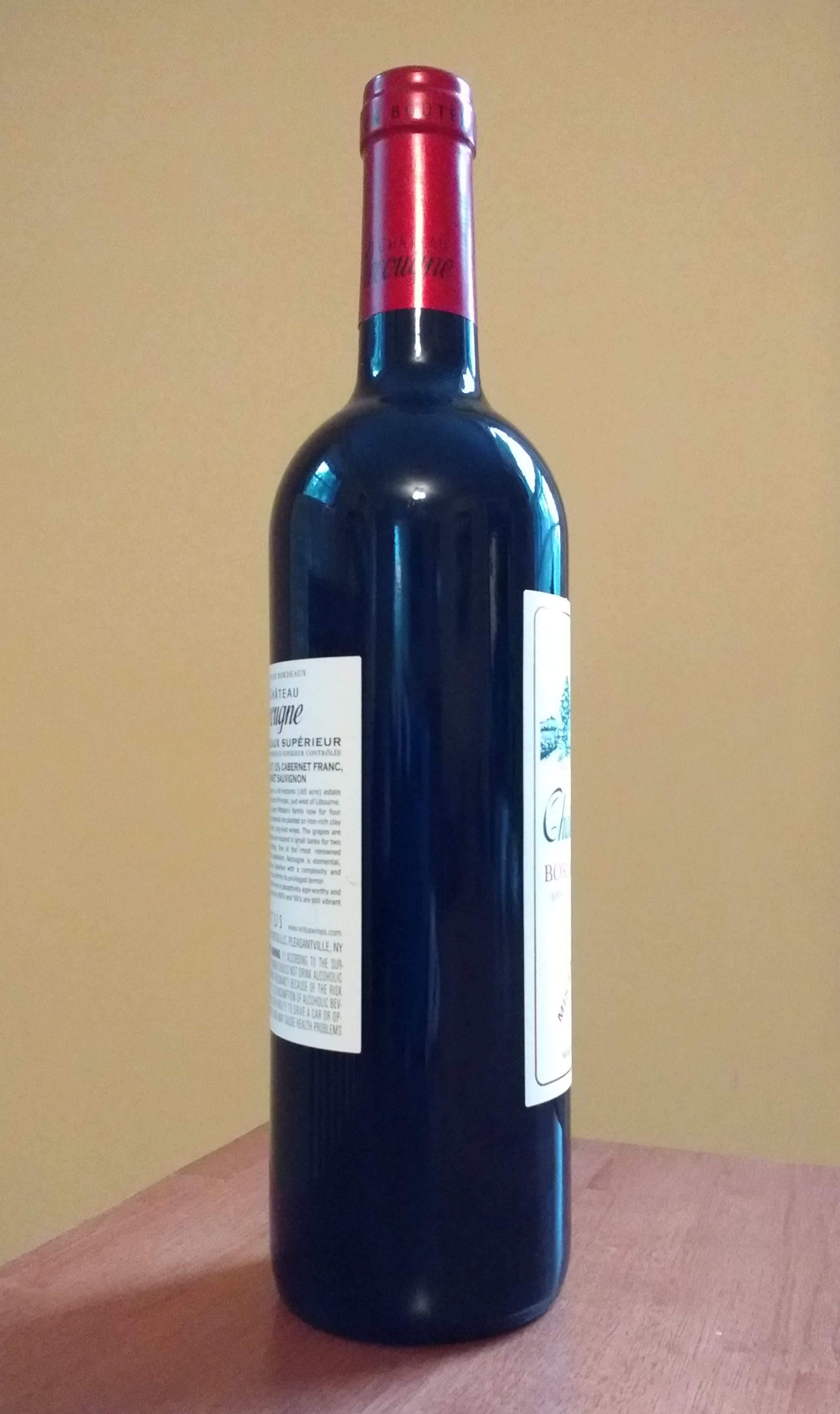 A bottle of Château Recougne Bordeaux Supérieur red wine. 78% Merlot, 12% Cabernet Franc, 10% Cabernet Sauvignon.